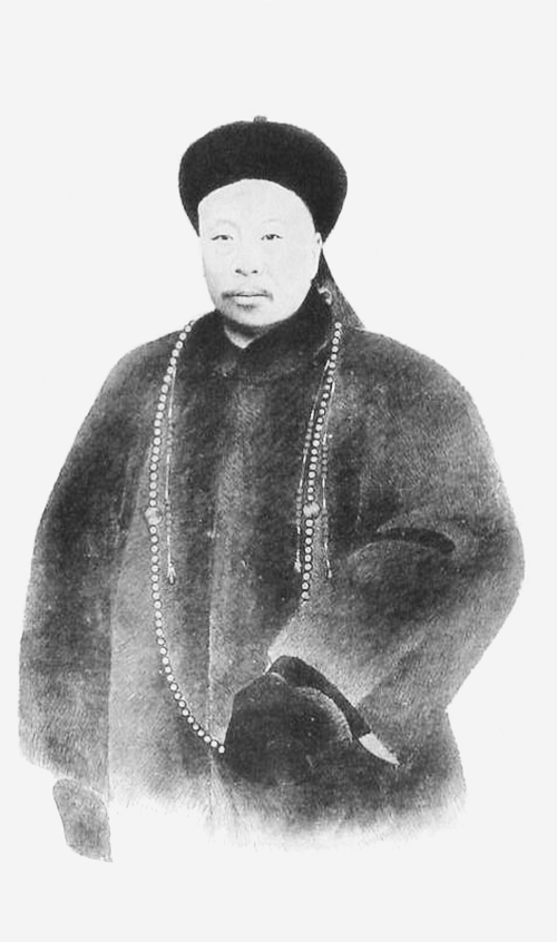 許景澄（1845年－1900年7月28日），原名癸身，字竹篔，一作竹筠，浙江嘉興人，晚清政治家、外交家。